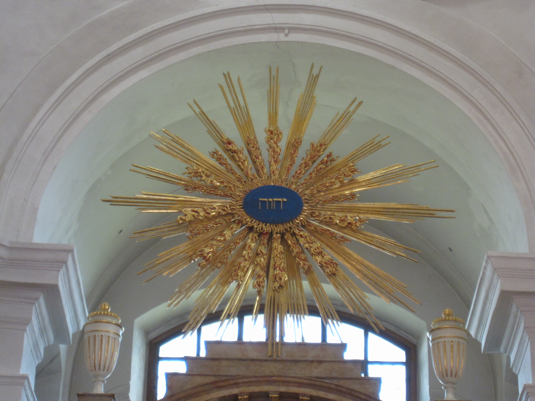 Sankt Leopold auf dem Leopoldsberg